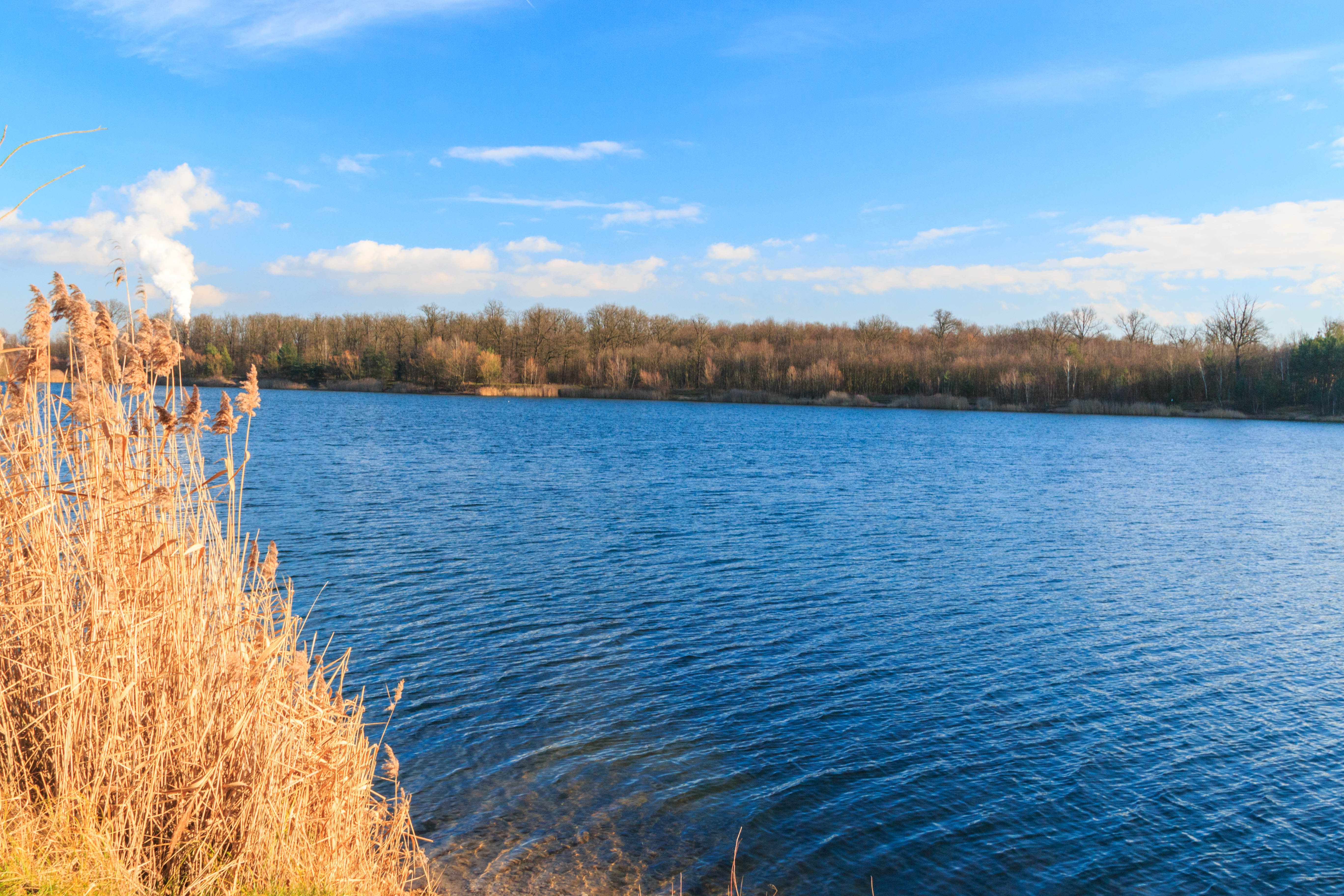 Písník Jezero u Stéblové Project: Vodstvo.